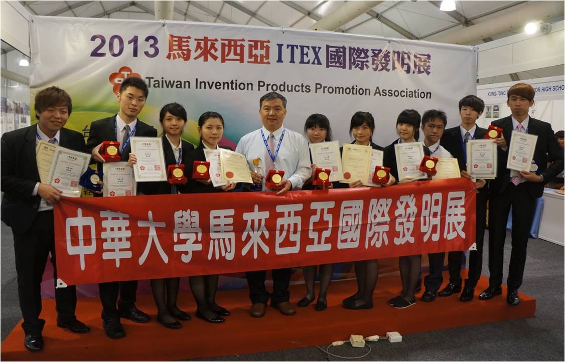 2013年馬來西亞國際發明展於吉隆坡會展中心舉辦。中華大學奪4金1銀。